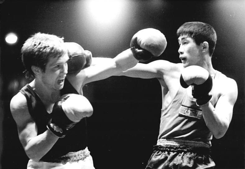 Ulf Graf, Jo Jong Gu ADN-ZB Lehmann 28.3.80 Halle: IX. Internationales Boxturnier um den Chemiepokal 1980 - Im Bantamgewicht besiegte Olympiasieger Jo Jong Gu (KDVR-r.) nach einer mäßigen Leistung den zu viel Respekt zeigenden Frankfurter Ulf Graf am 27.3. nach Punkten. Der Koreaner erreichte durch diesen Erfolg das Halbfinale, in dem er am 28.3. auf den Kubaner Jesus Sollet trifft.